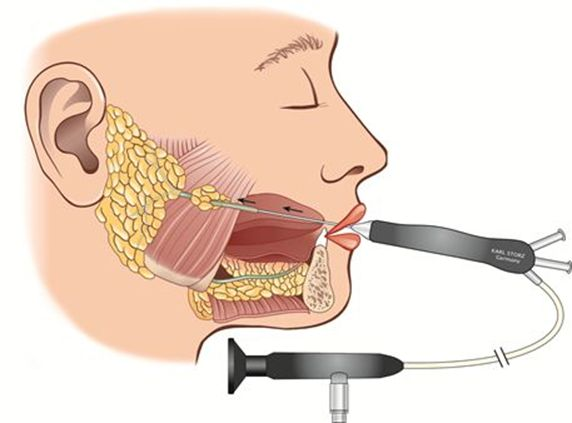 Das semirigide Speichelgangendoskop wurde in den Stenon-Gang eingeführt. Je ein Kanal dient als Lichtkanal, Arbeitskanal und als Spülkanal.